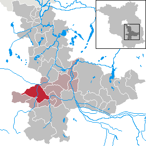 Golßen in Brandenburg (Country) - District Dahme-Spreewald